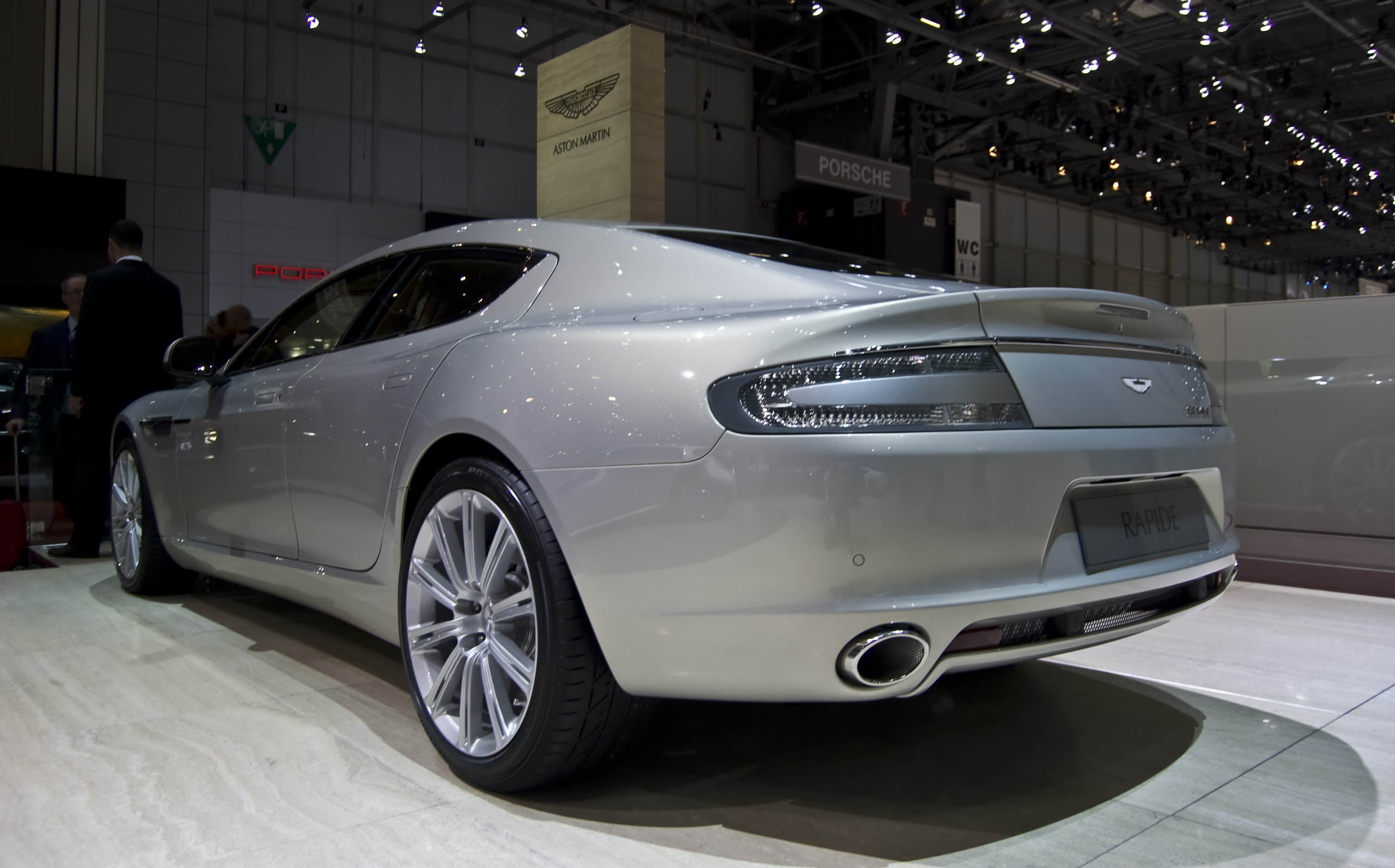 Aston Martin Rapide en el Salón de Ginebra 2010.